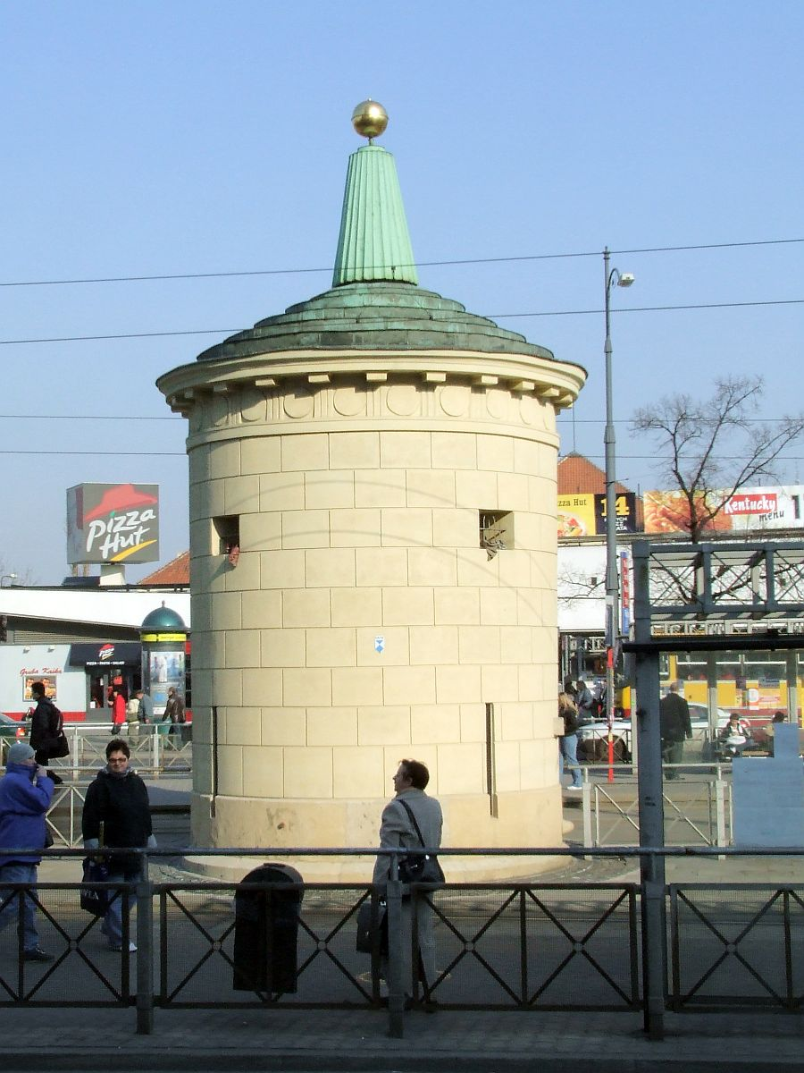 Wodozbiór Gruba Kaśka. XVIII w. Warszawa, architekt Szymon Bogumił Zug